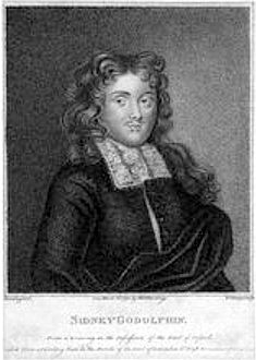 Sidney Godolphin - Poet (1610-1643)